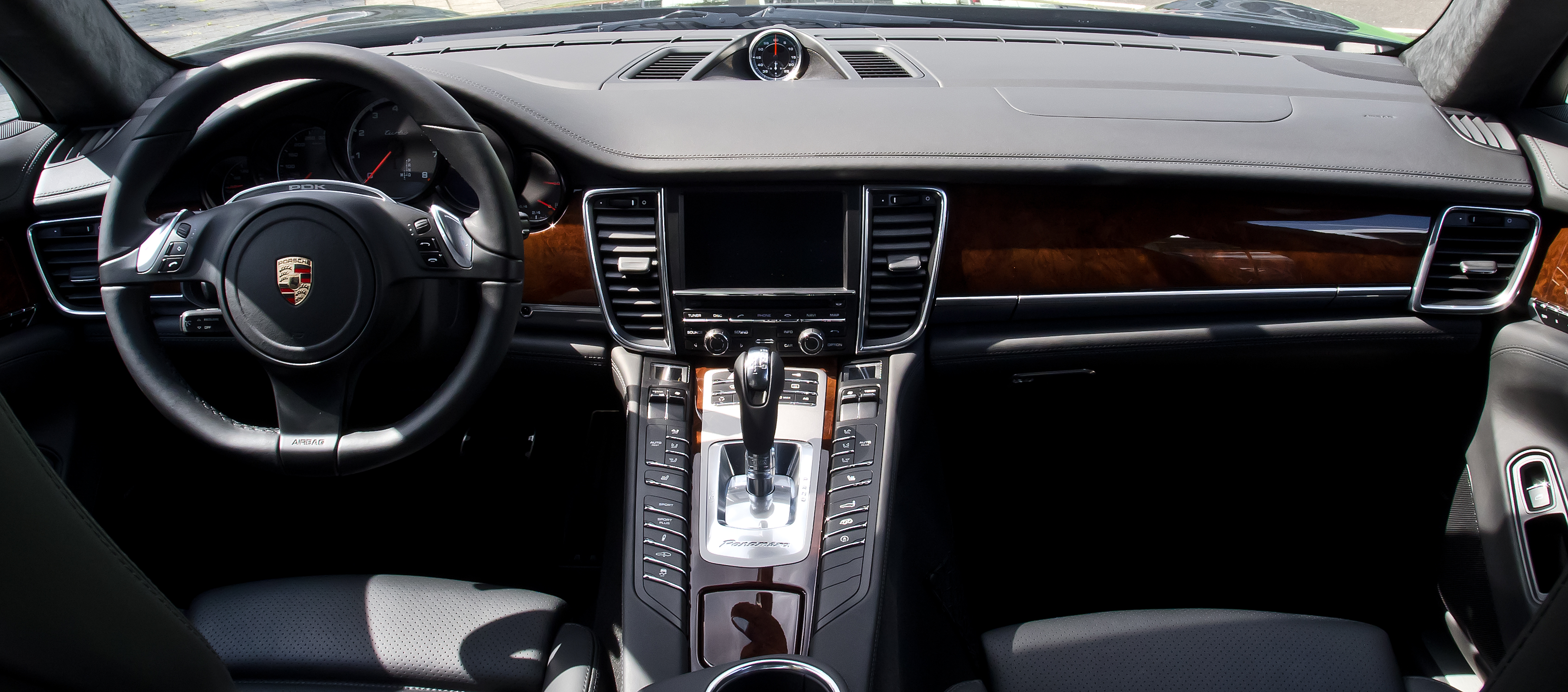 Porsche Panamera Turbo (970)